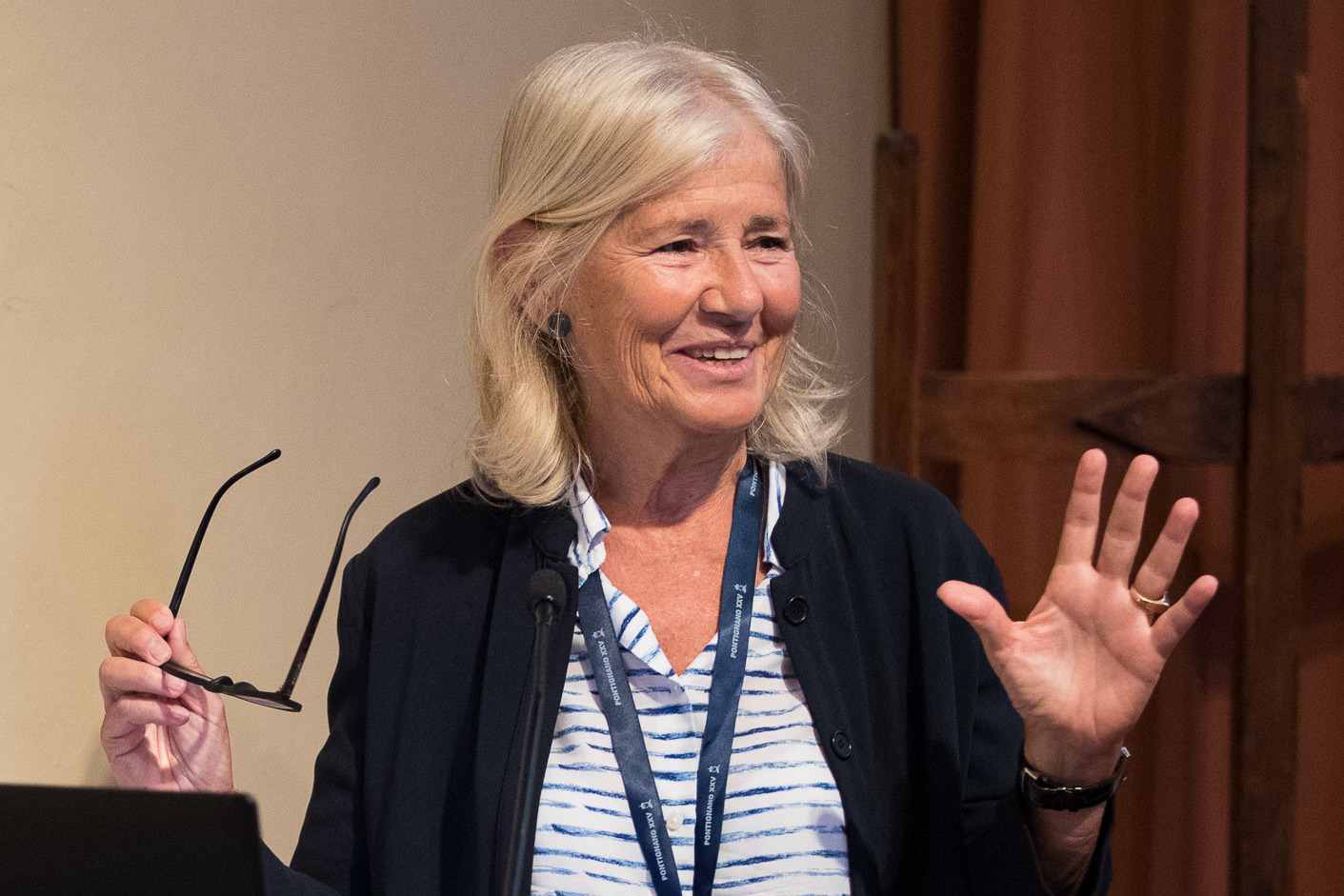 Marta Dassù